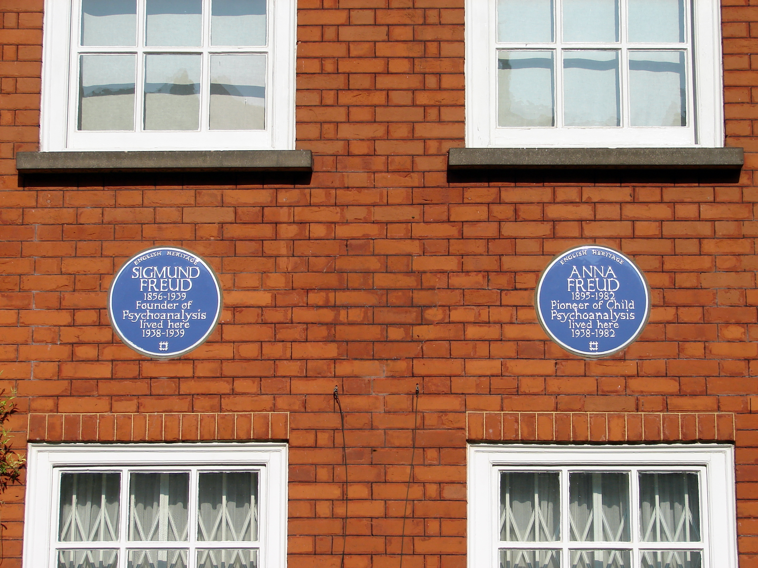 Sigmund and Anna Freud